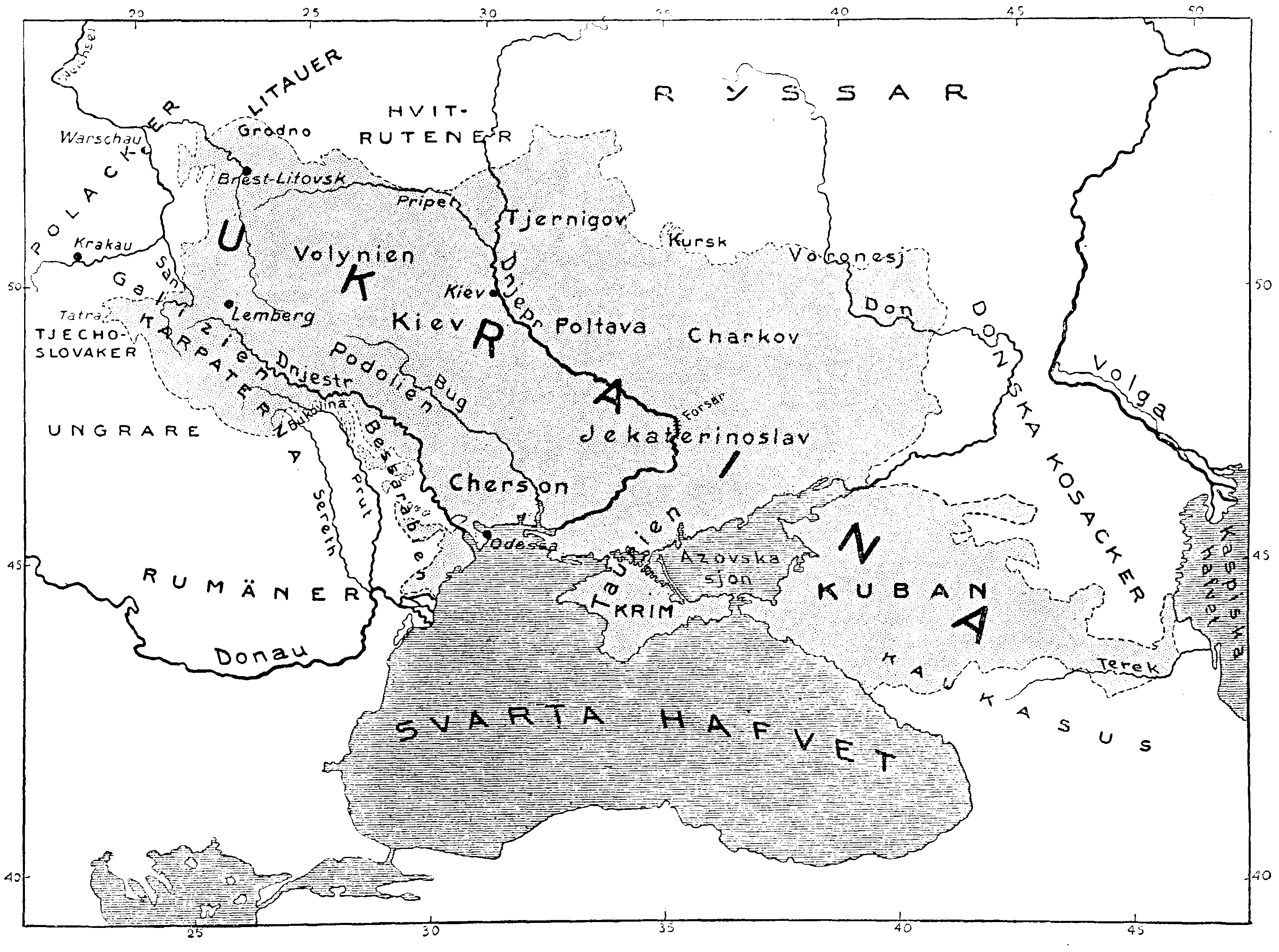 Karta över det av främst ukrainare bebodda området. Karta ur Nordisk familjebok, 1920.